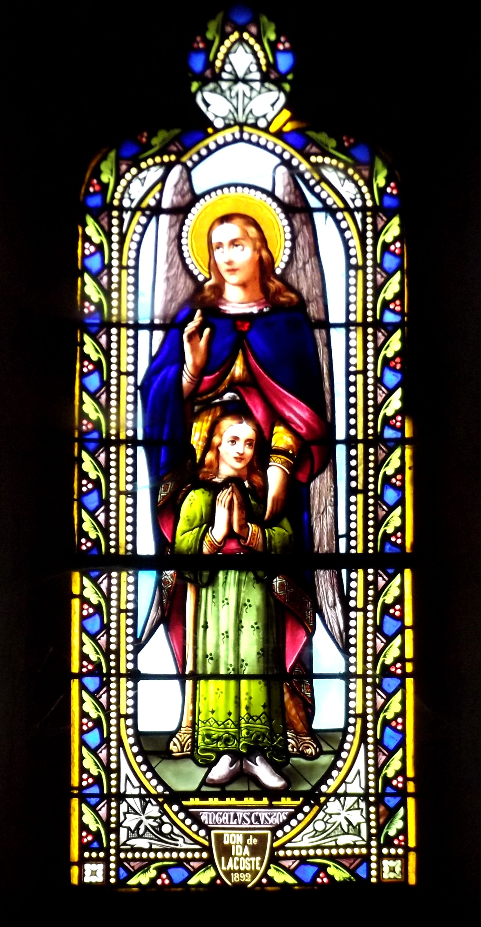 Église du XIVe restaurée au XVIIIe